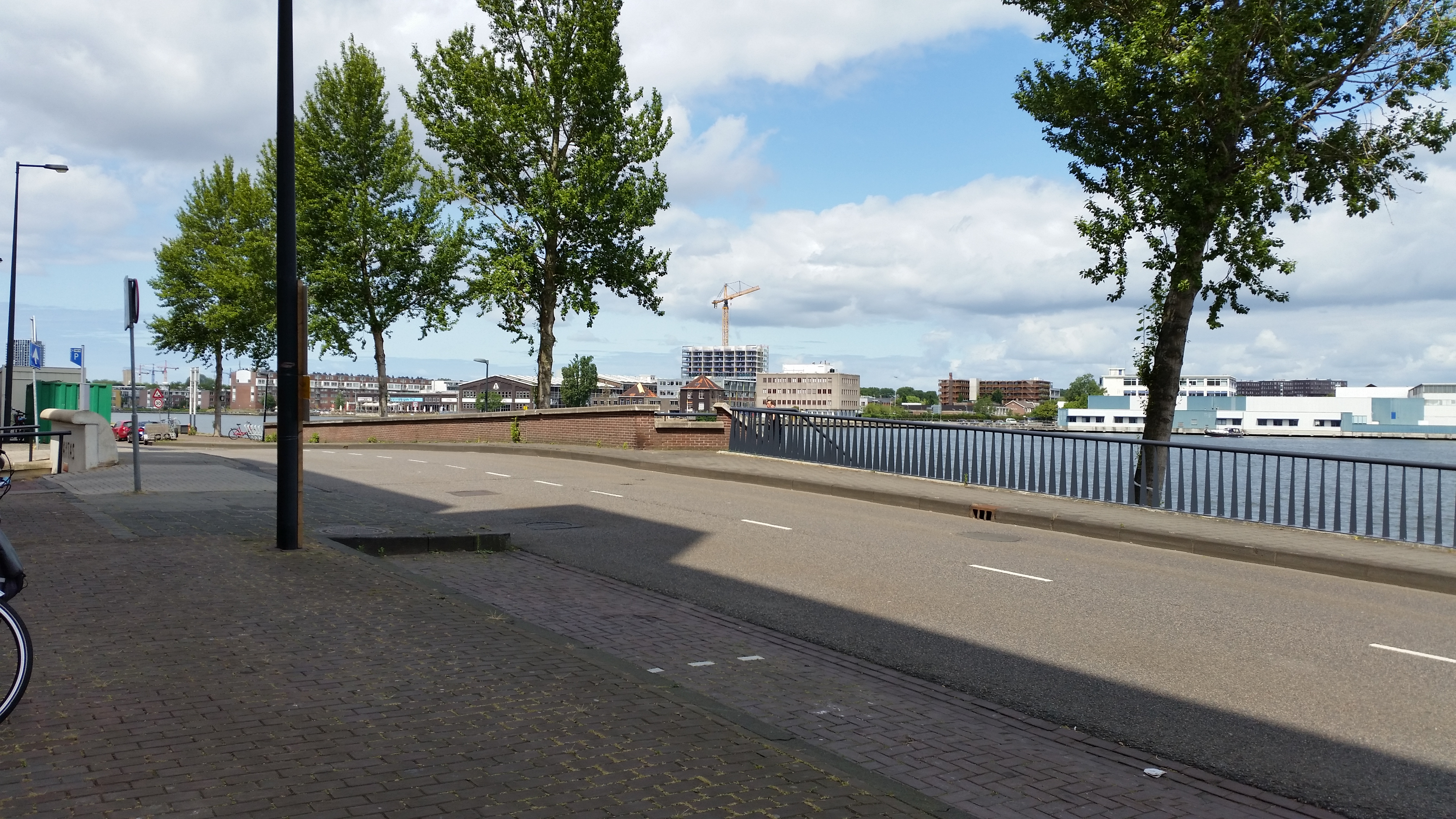 Overzicht over Brug 1993, Brantas